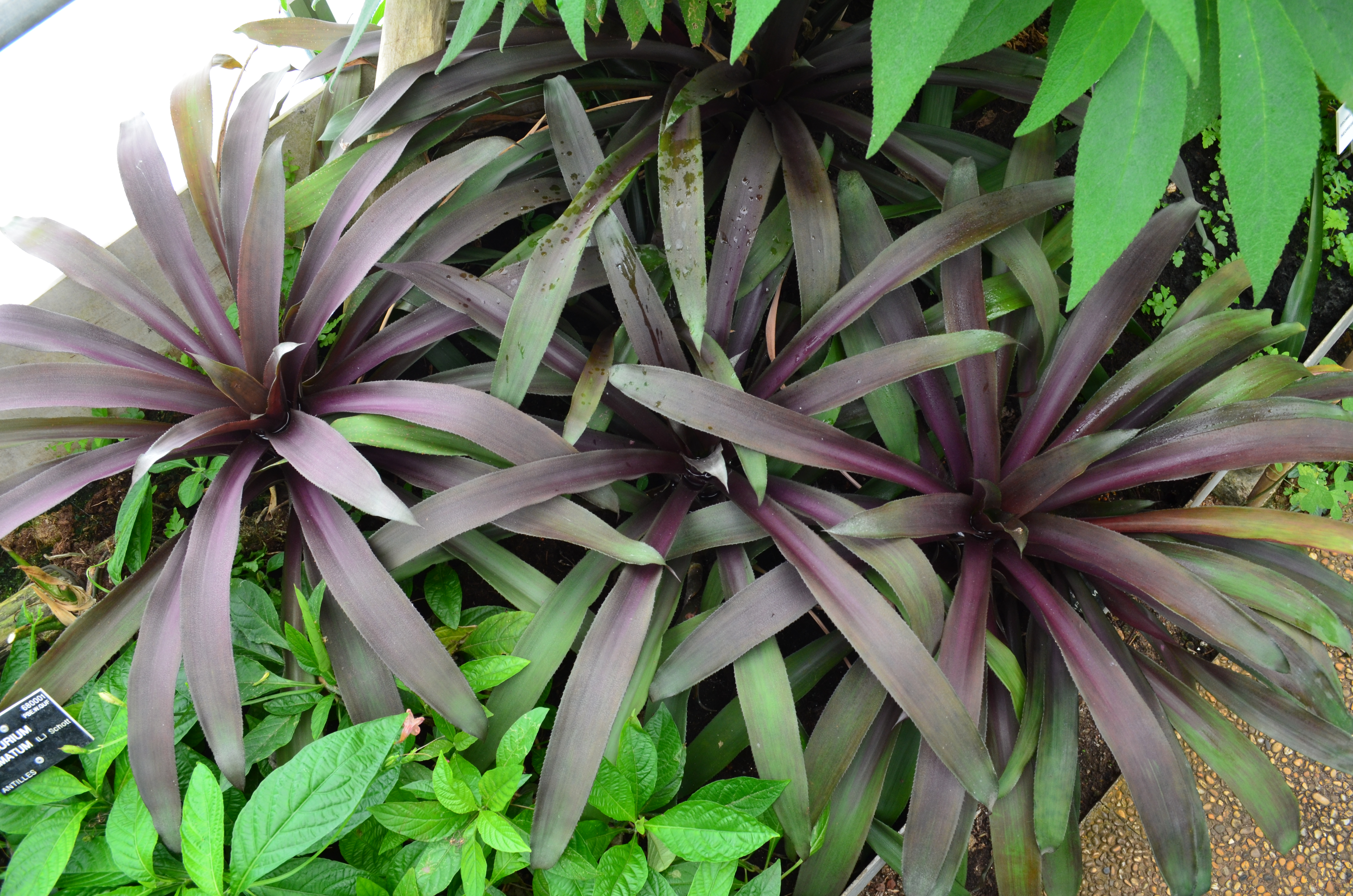 Specimen de Nidularium purpureum, espèce de Bromeliaceae dans les serres du jardin botanique de Lyon (France), au parc de la Tête-d'Or